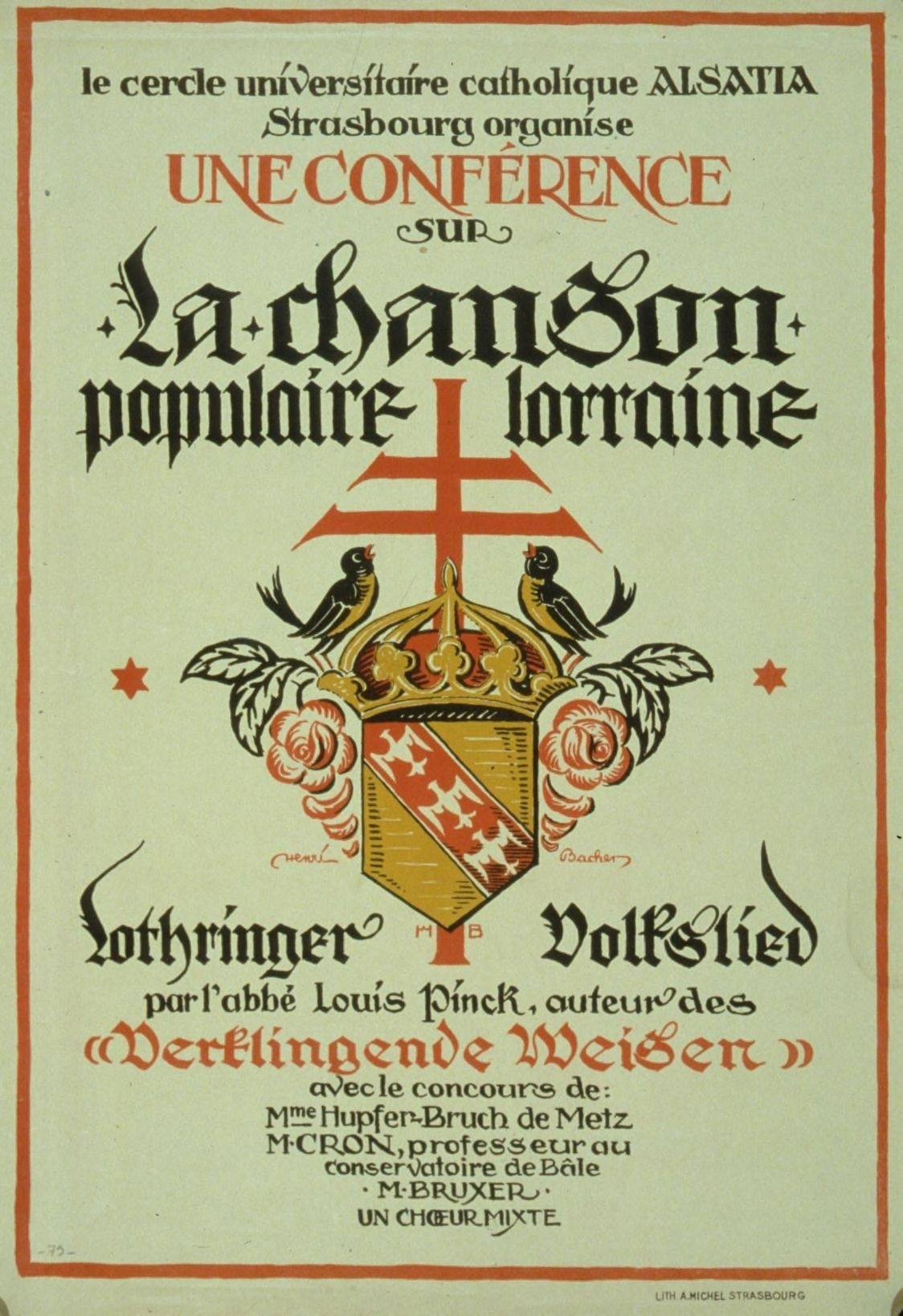 Conference sur la chanson populaire lorraine; Lothringer Volkslied, par l'abbe Louis Pinck.. Bibliothèque nationale et universitaire de Strasbourg